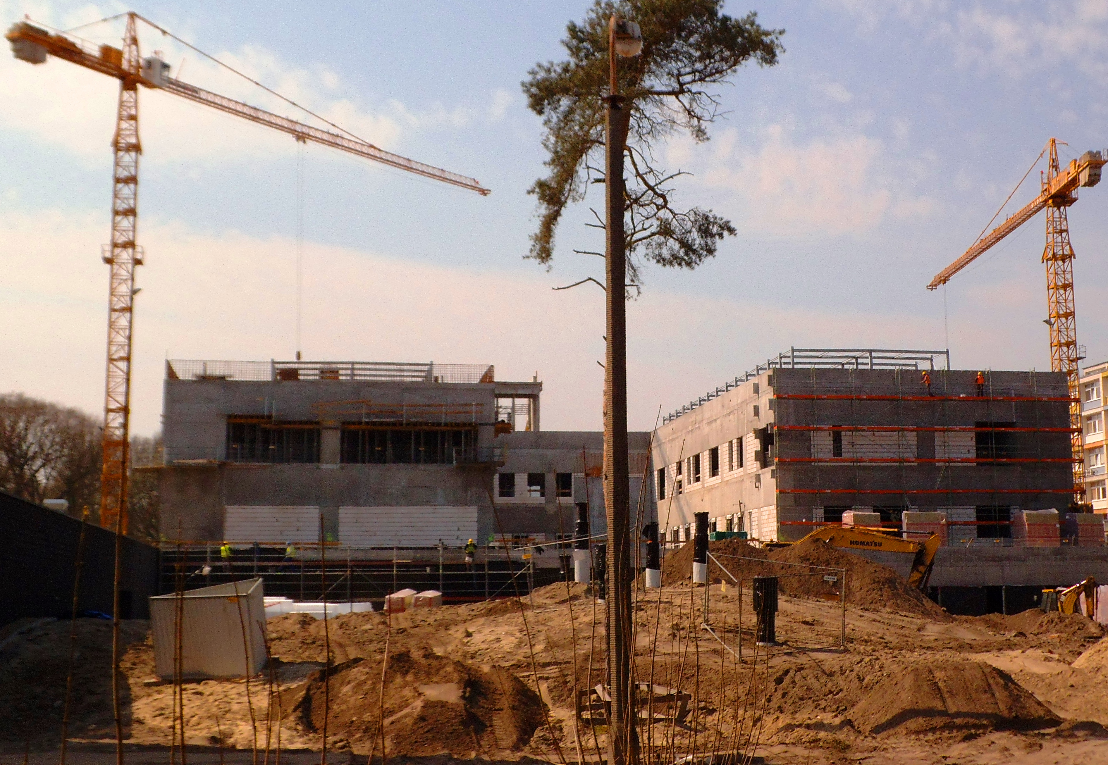 Budowa głównego budynku WSZ w Toruniu, kwiecień 2018 rok